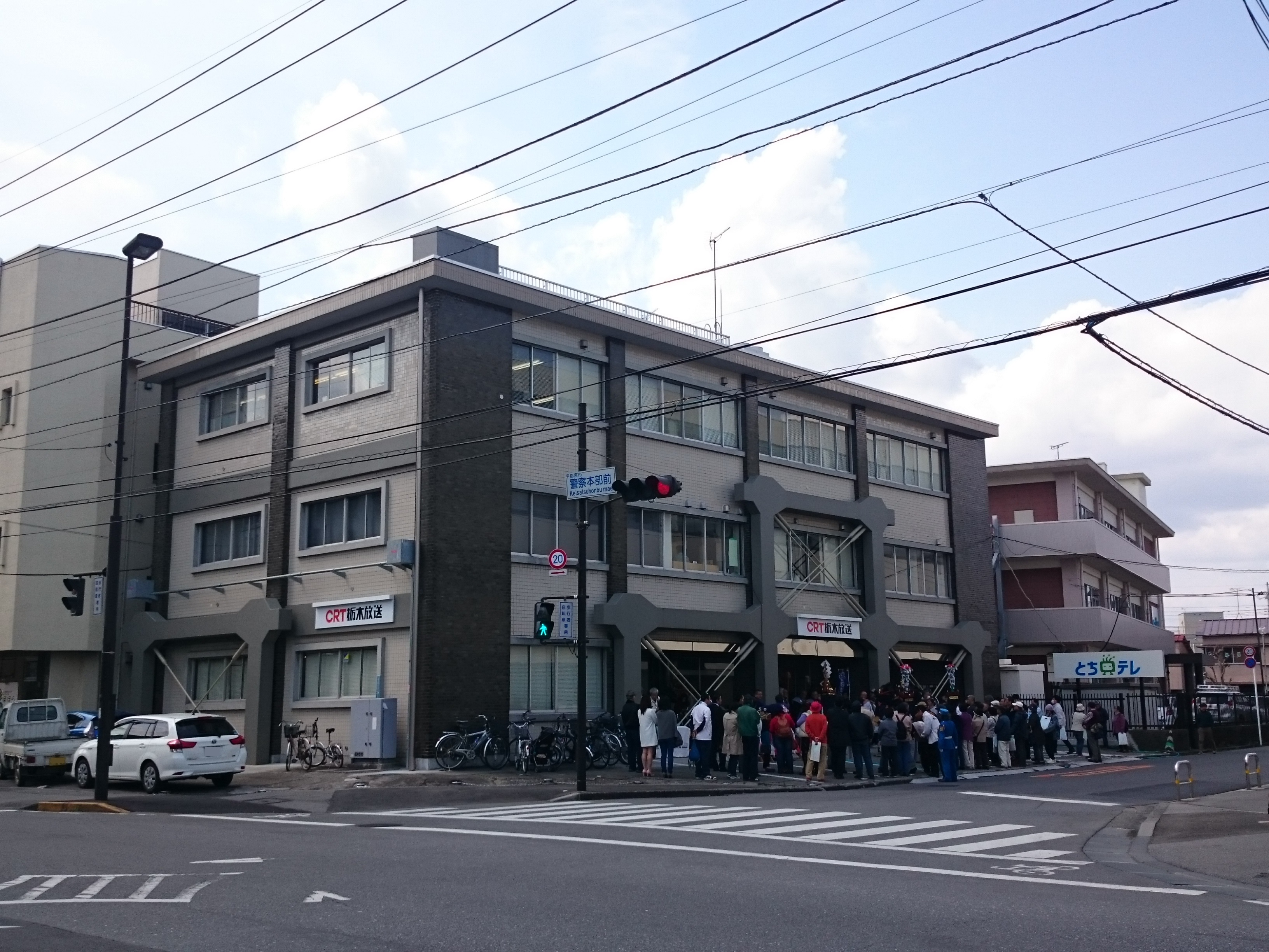 栃木放送の新社屋・スタジオが入居した建物